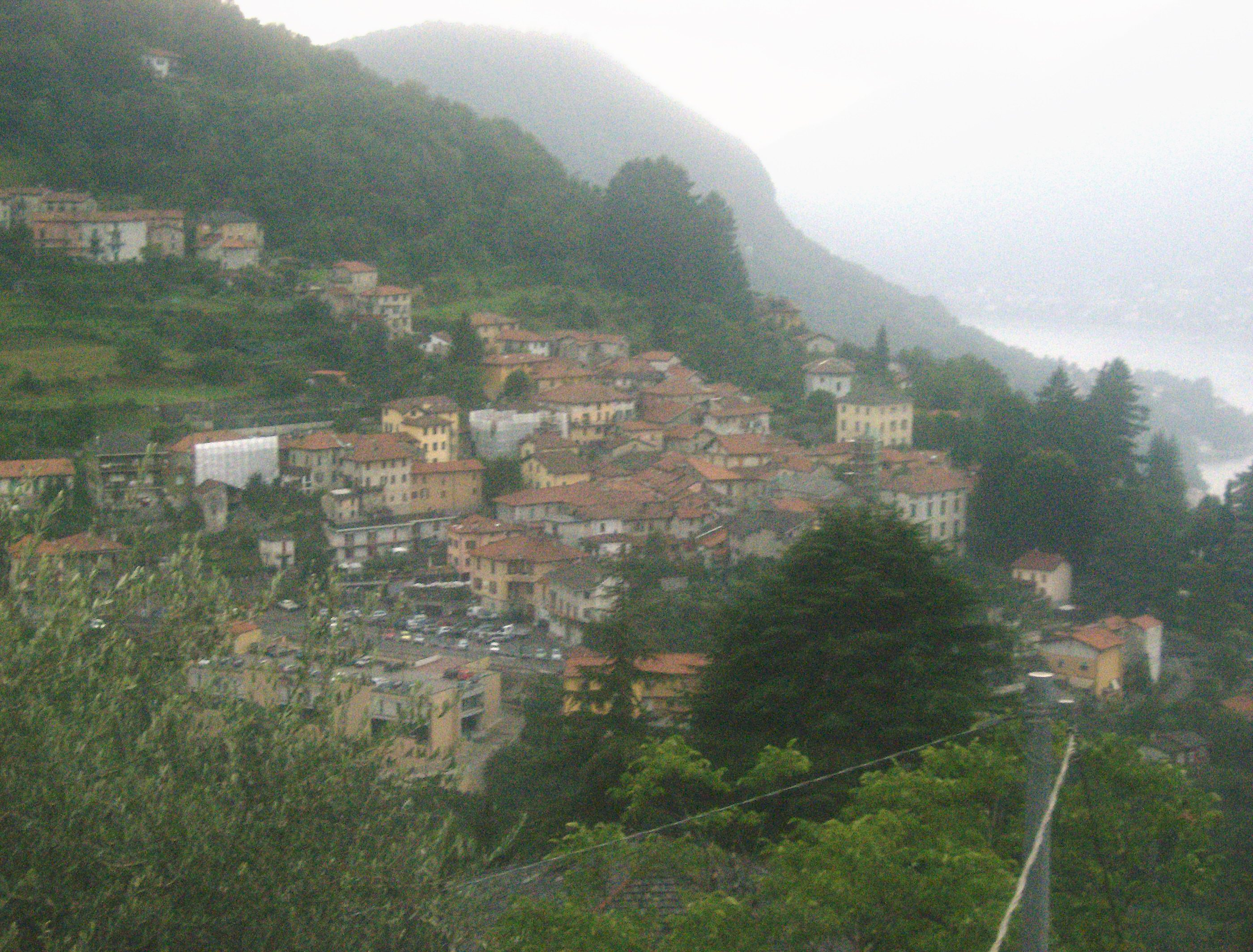 Faggeto Lario (CO), frazione Molina